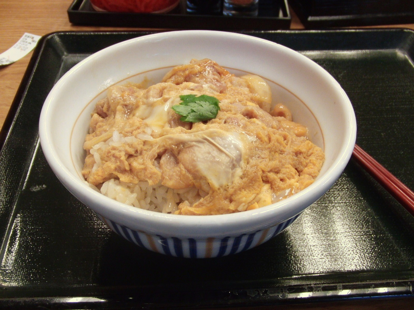 なか卯の親子丼（並）を撮影